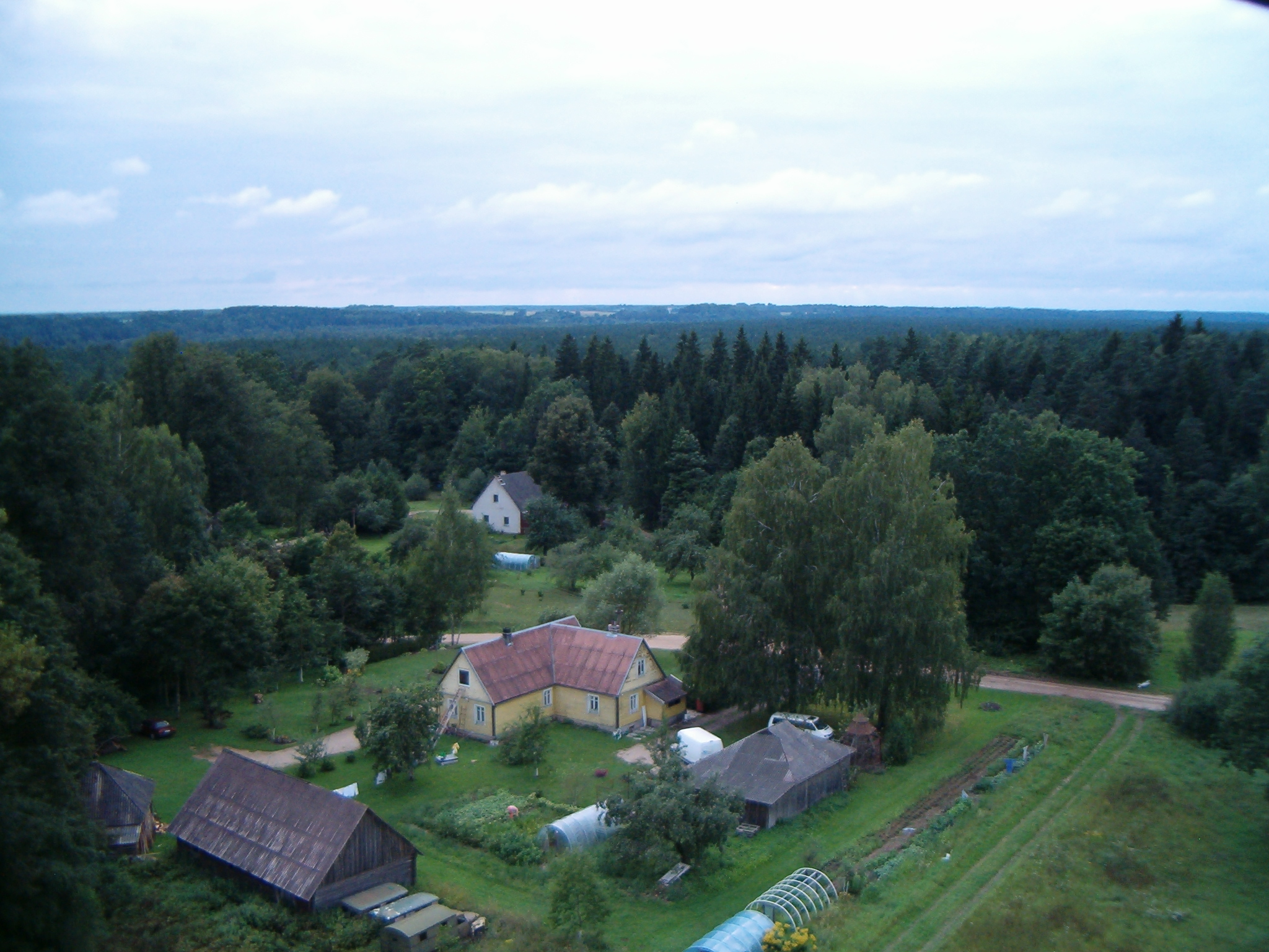 Anykščių sen., Lithuania